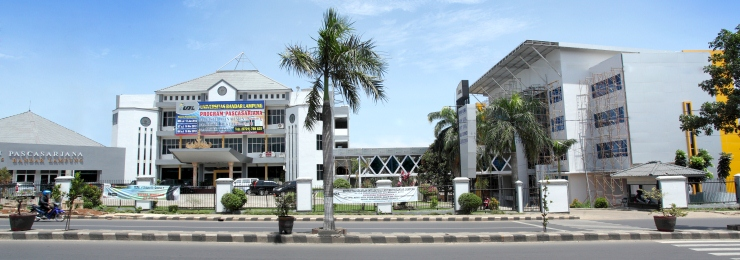 kampus b